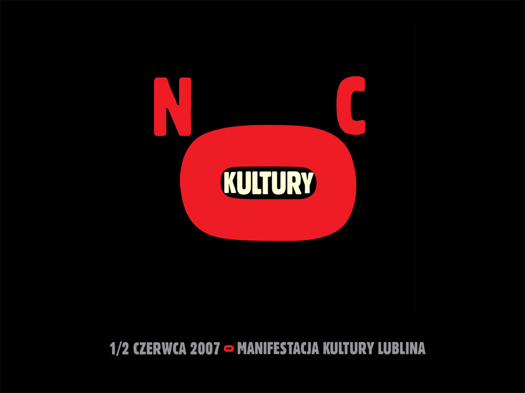 Plakat Nocy Kultury w Lublinie